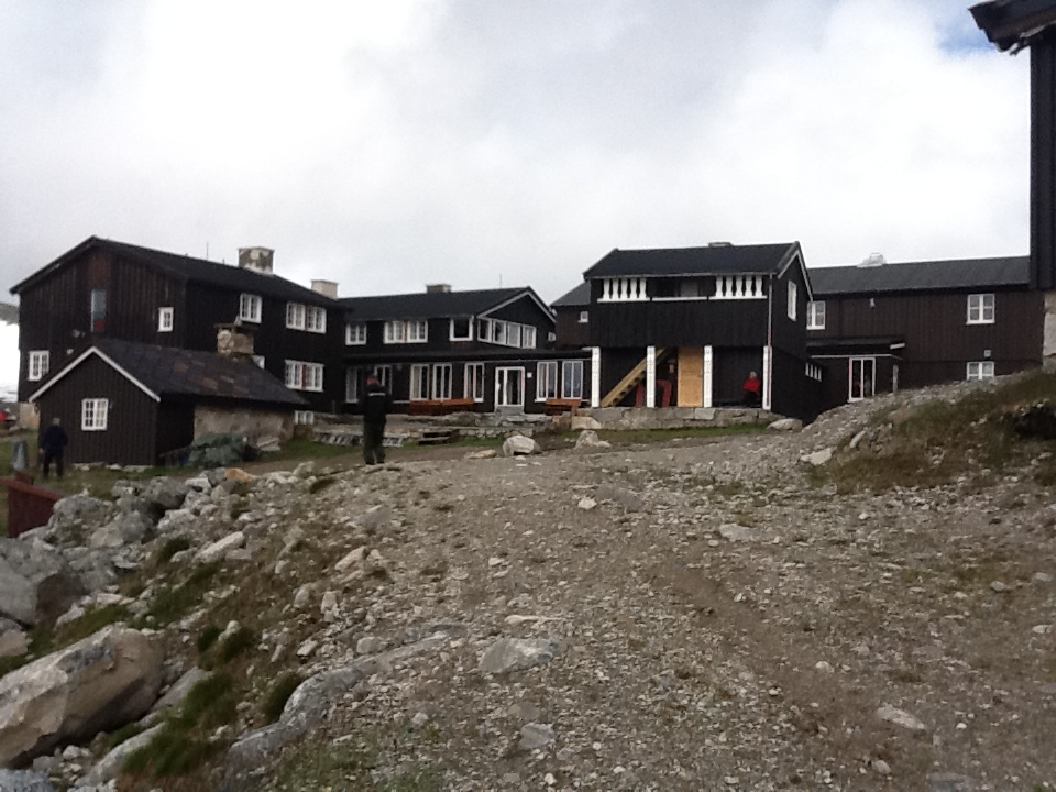 Snøheim-DNT sin turisthytte ved foten av Snøhetta på Dovrefjell